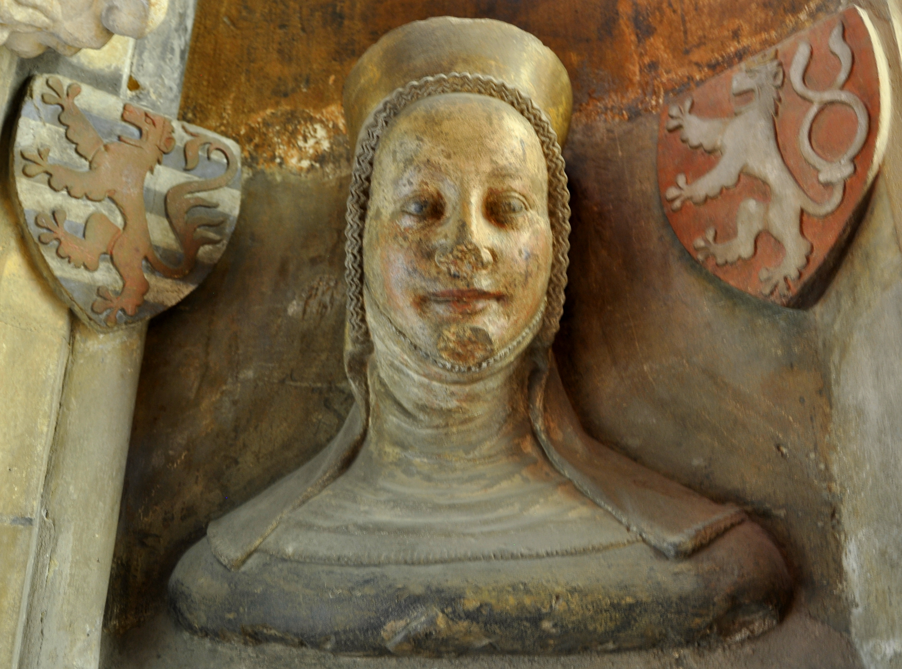 Busta Elišky Přemyslovně v triforiu svatovítské katedrály.